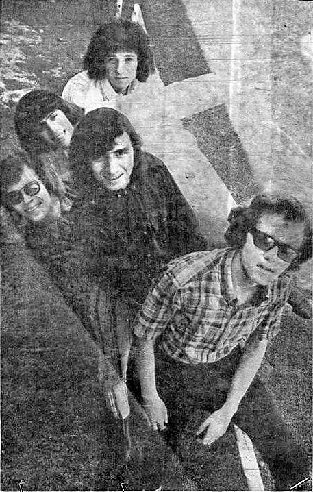 Silvano Chimenti, Alberto Maggi, Nello Lentinello, Tony Cirelli, Marco Cippitelli (Nuovo Cantante)